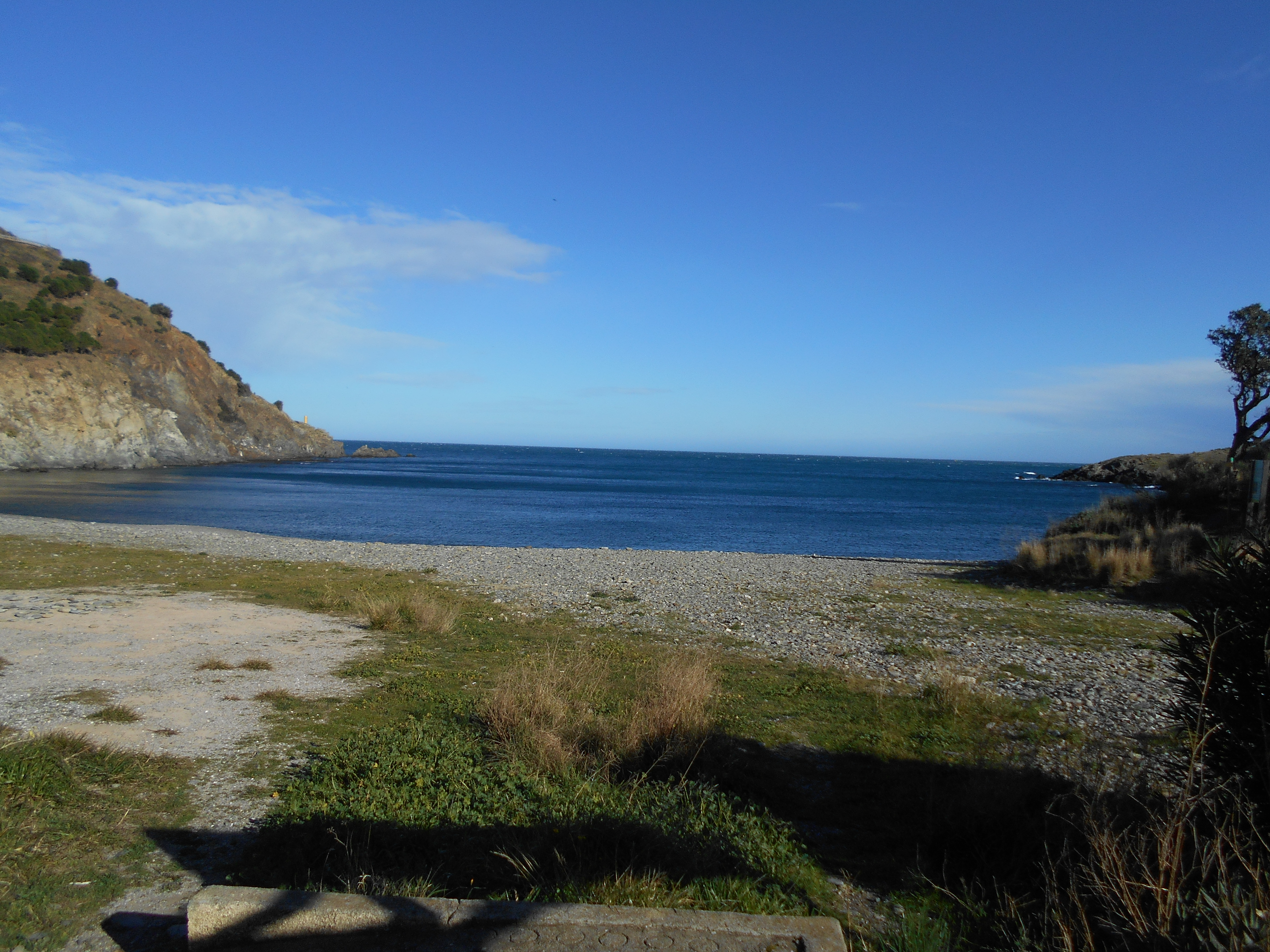 L'Ansa -cala- de Perafita, al límit de Banyuls i de Cervera, tots dos de la Marenda.